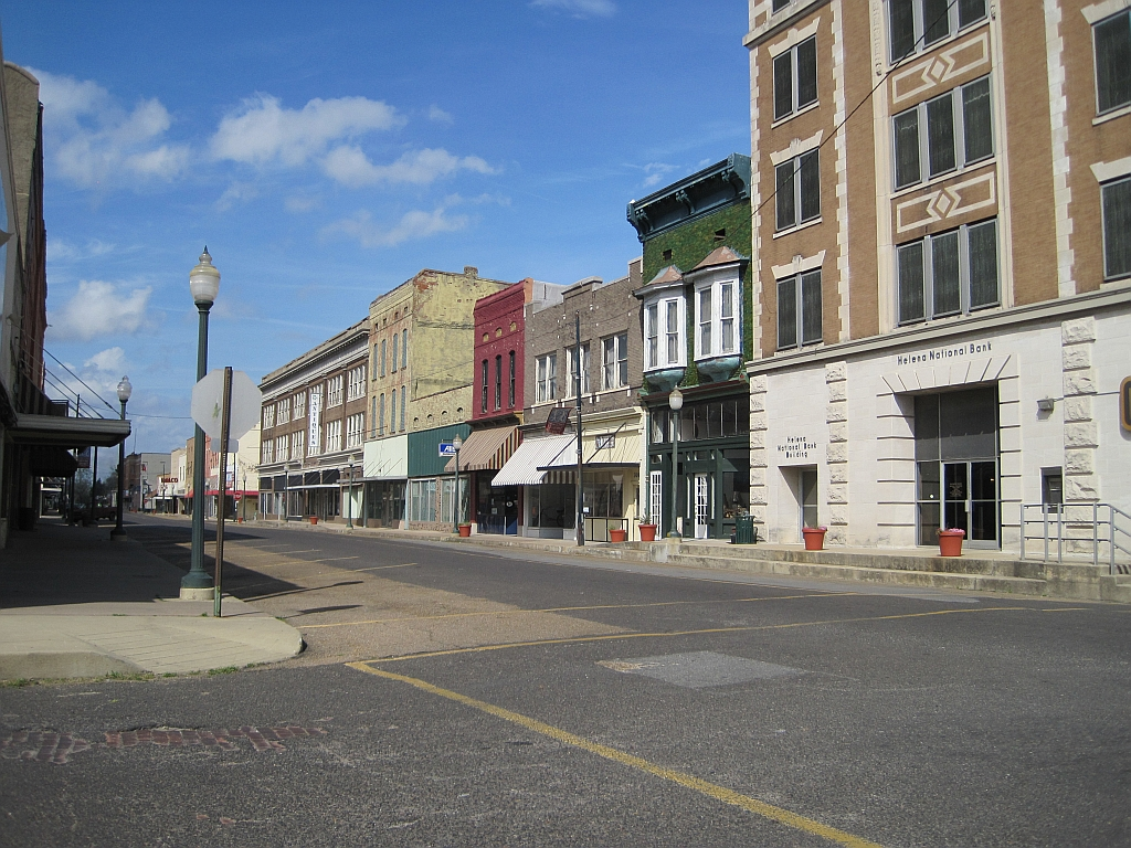 Helena, Arkansas